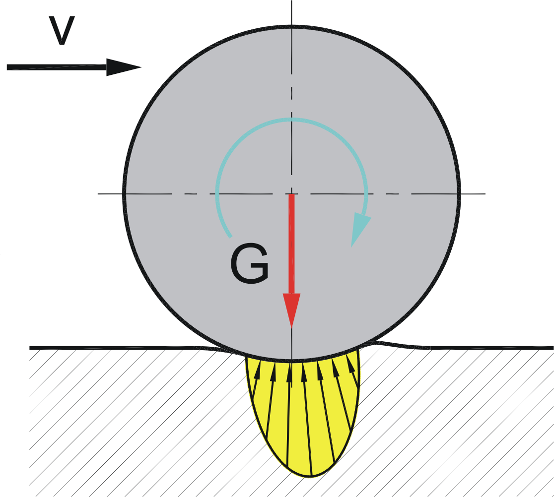 Magyarázó ábra a gördülő ellenálláshoz